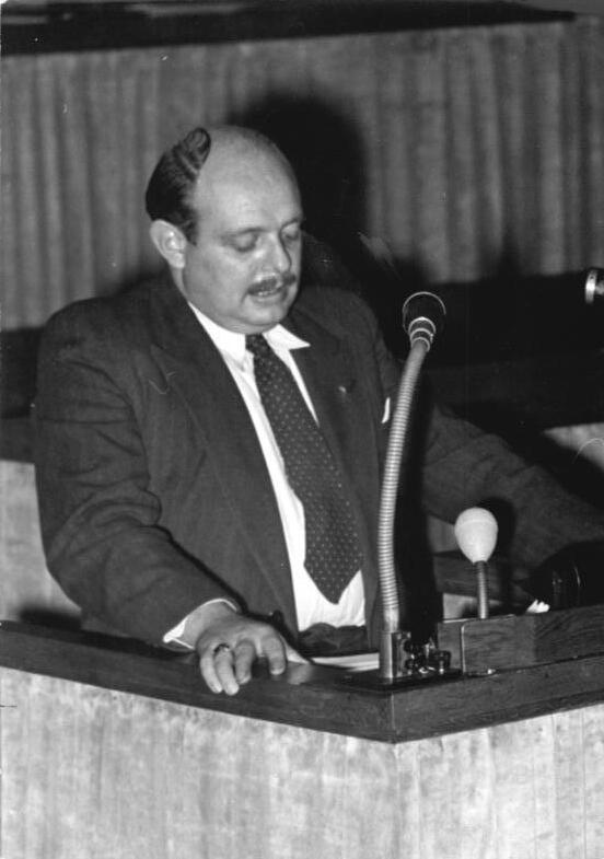 Illus/Quaschinsky 1.11.51 13. und 14. Sitzung der Volkskammer Die Volkskammer der DDR trat am 31.10.51 und 1.11.51 zu ihrer 13. und 14. Sitzung zusammen, um u.a. über das "Gesetz über den Fünfjahresplan zur Entwicklung der Volkswirtschaft der Deutschen Demokratischen Republik", den "Rechenschaftsbericht der Regierung über die Einnahmen der Republik und ihre Verwendung für das Rechnungsjahr 1950" und das "Gesetz über die Deutsche Notenbank" zu beraten. UBz: Abgeordneter Ganter-Gilmanns spricht für die CDU.